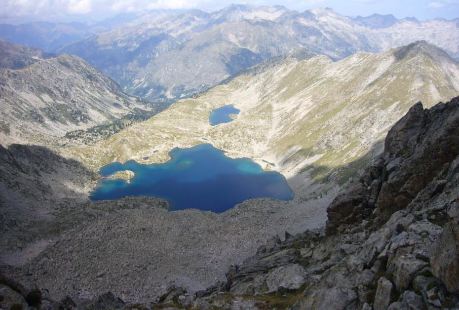 Vall de Morrano vista des del Pic de Mariolo; la Vall de Boí, Alta Ribagorça, Catalunya